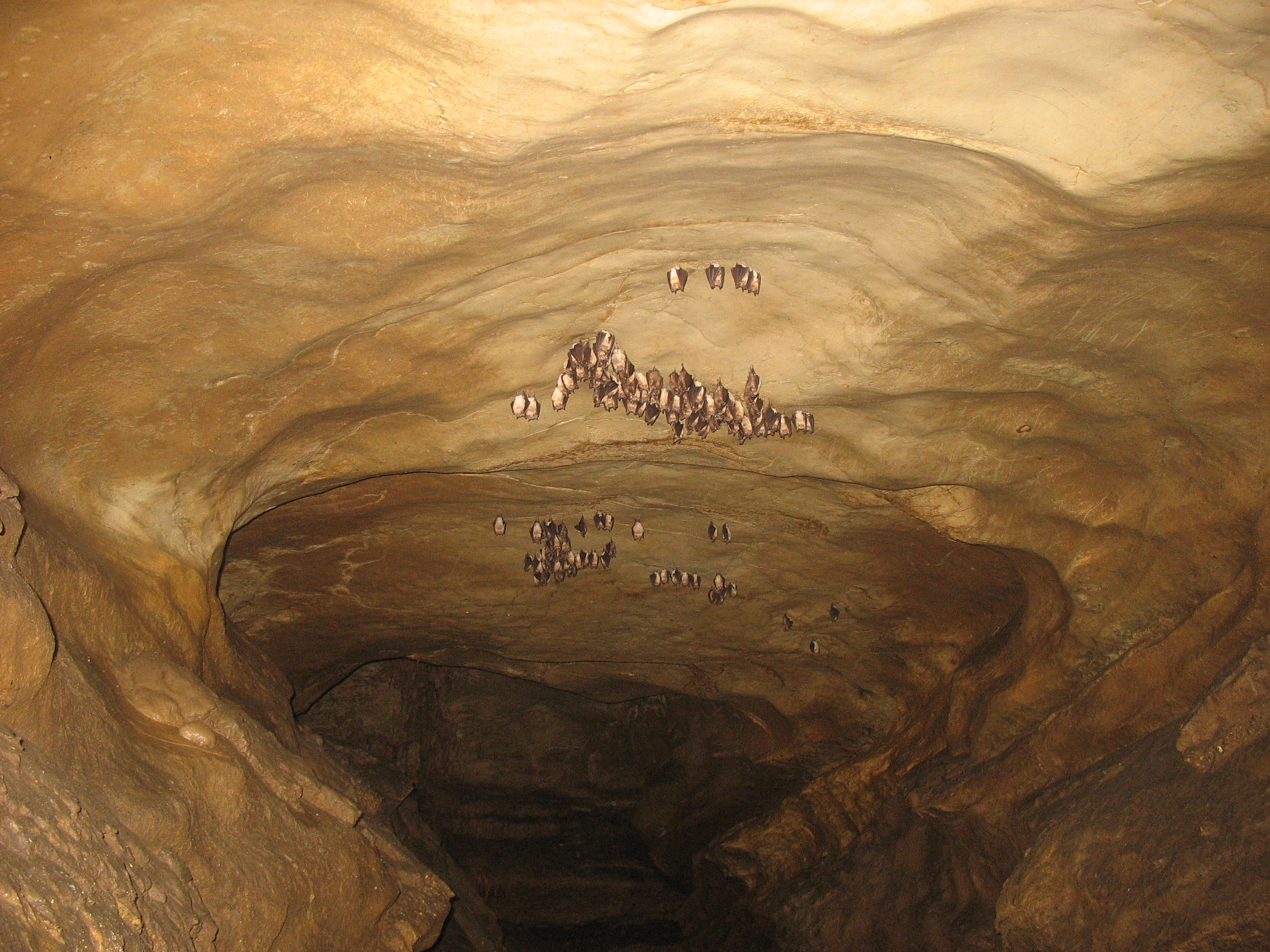 Salıkkaya Mağarası.